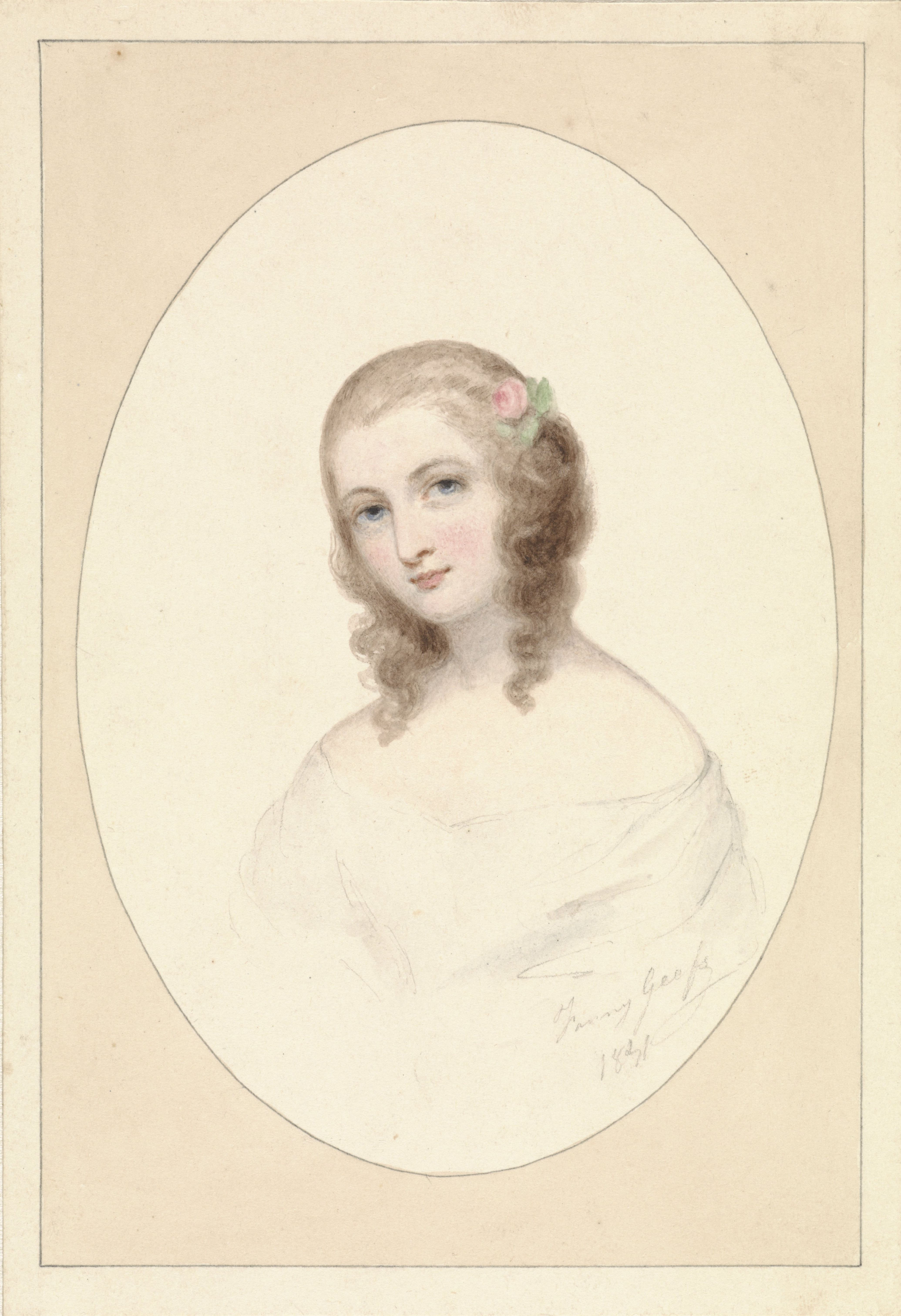 Zelfportret van Fanny Geefs (1841)